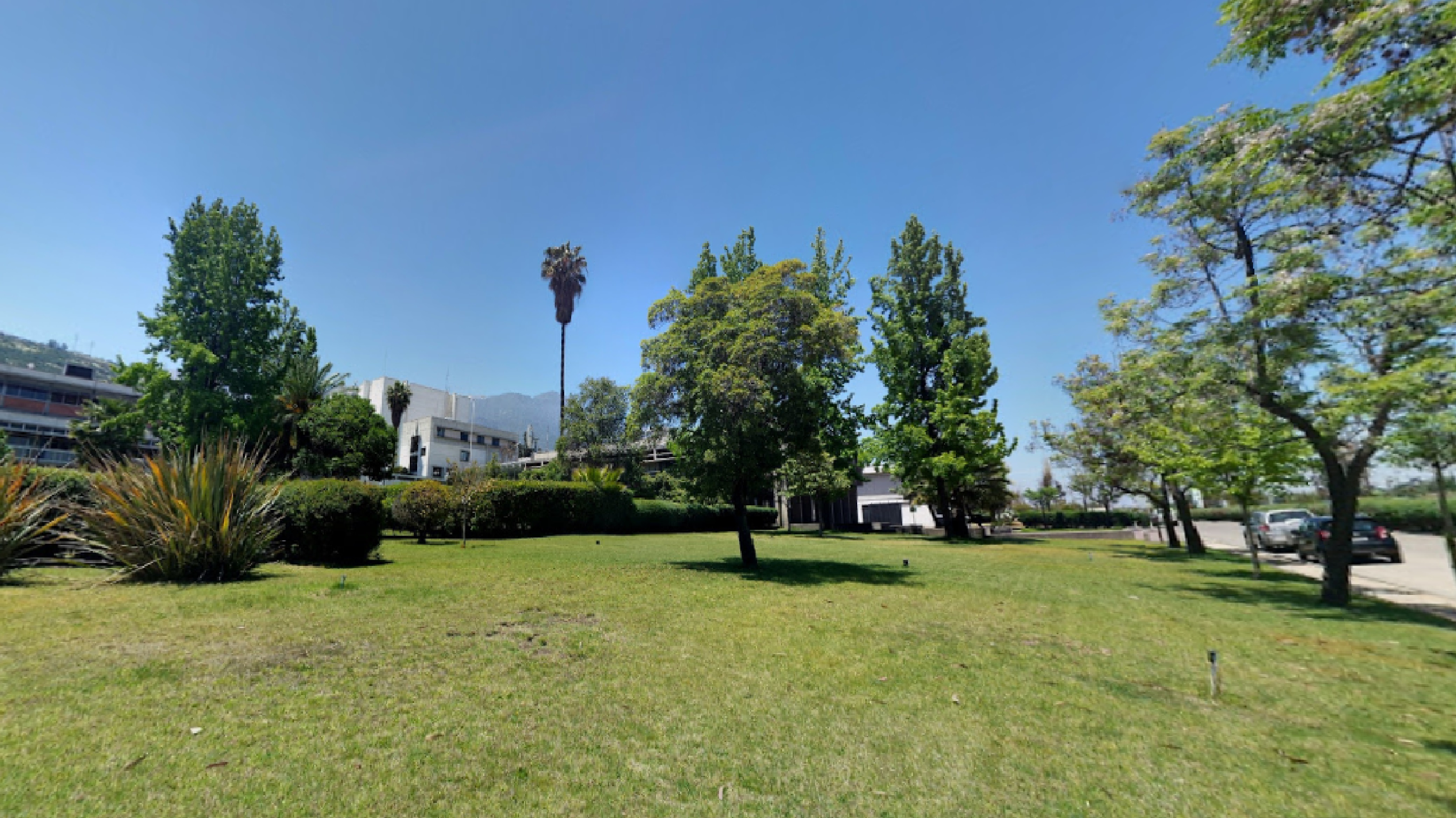 Centro de Estudios Nucleares la Reina. Ubicado en Avda. Nueva Bilbao Nº 12.501, Santiago, Chile. Fue el primer edificio de la CChEN donde se encuentra el primer reactor Nuclear Chileno.